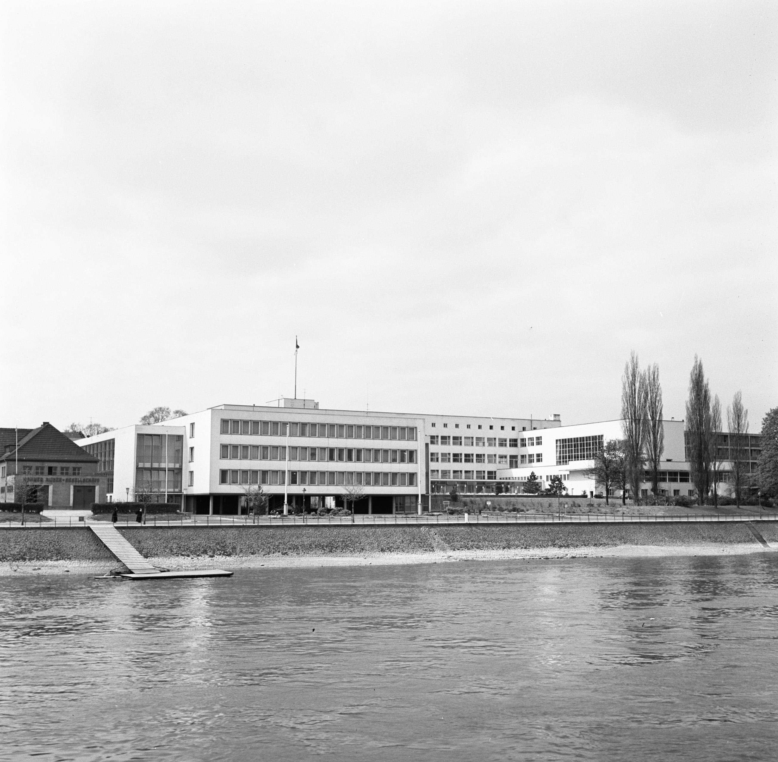 Collectie / Archief : Fotocollectie Van de Poll Reportage / Serie : Rijnvaart, reportage vanaf sleepboot Damco 9: West-Duitsland Beschrijving : De Bondsdag in Bonn, gezien vanaf de Rijn Datum : 1 april 1955 Locatie : Bonn, Duitsland, West-Duitsland Trefwoorden : parlementsgebouwen, rivieren, stadsbeelden Fotograaf : Poll, Willem van de Auteursrechthebbende : Nationaal Archief Materiaalsoort : Negatief (6x6) Nummer archiefinventaris : bekijk toegang 2.24.14.02 Bestanddeelnummer : 254-1045